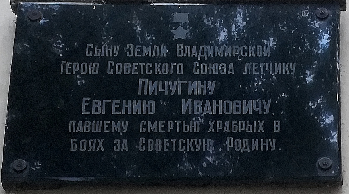 Владимир